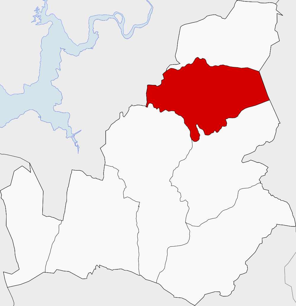 Extensión de la parroquia de Lesende en Lousame